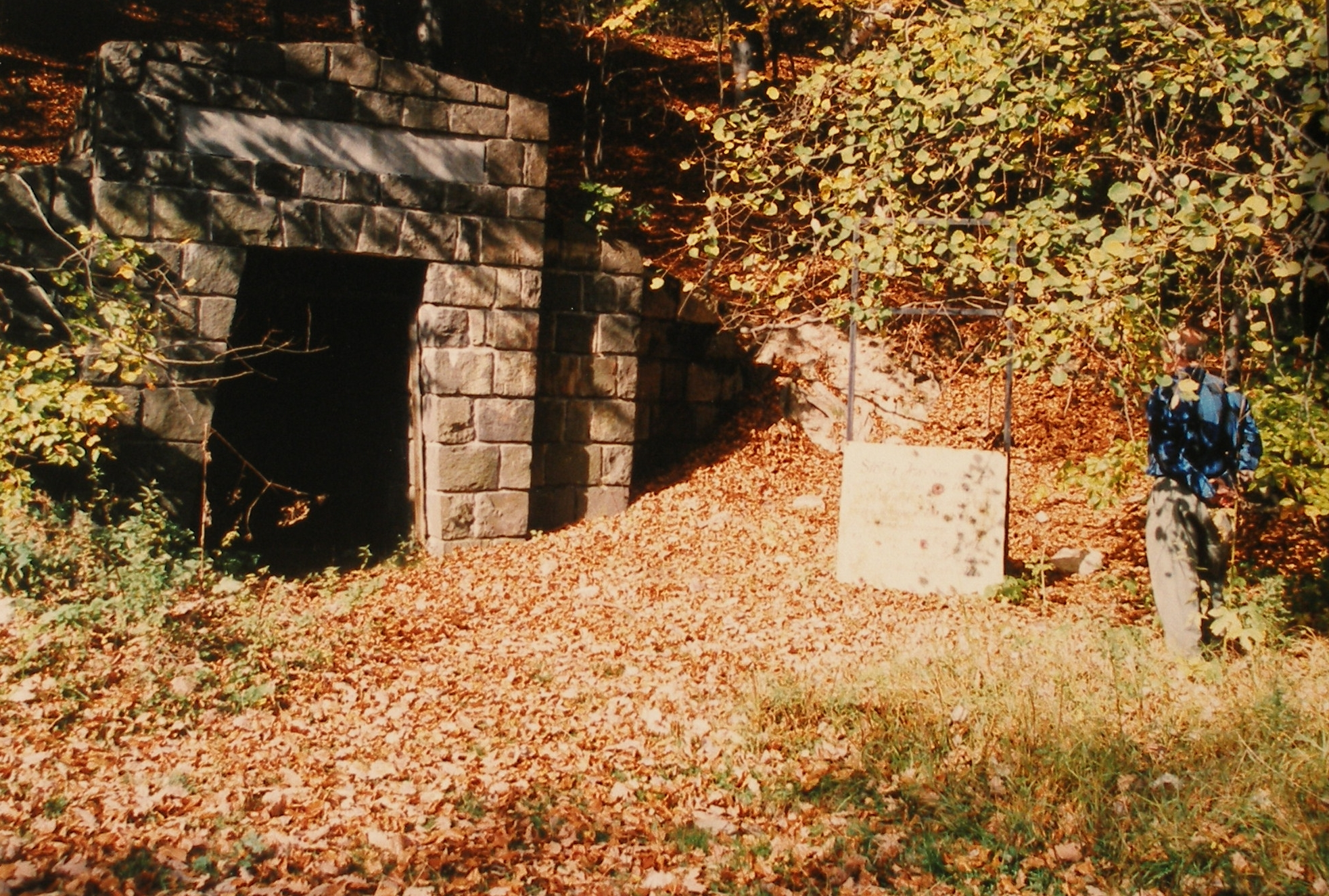 Banský priestor - Vchod do štôlne Jozef,okres Prešov,región Šariš.Obrázok je z 15.10.2000.